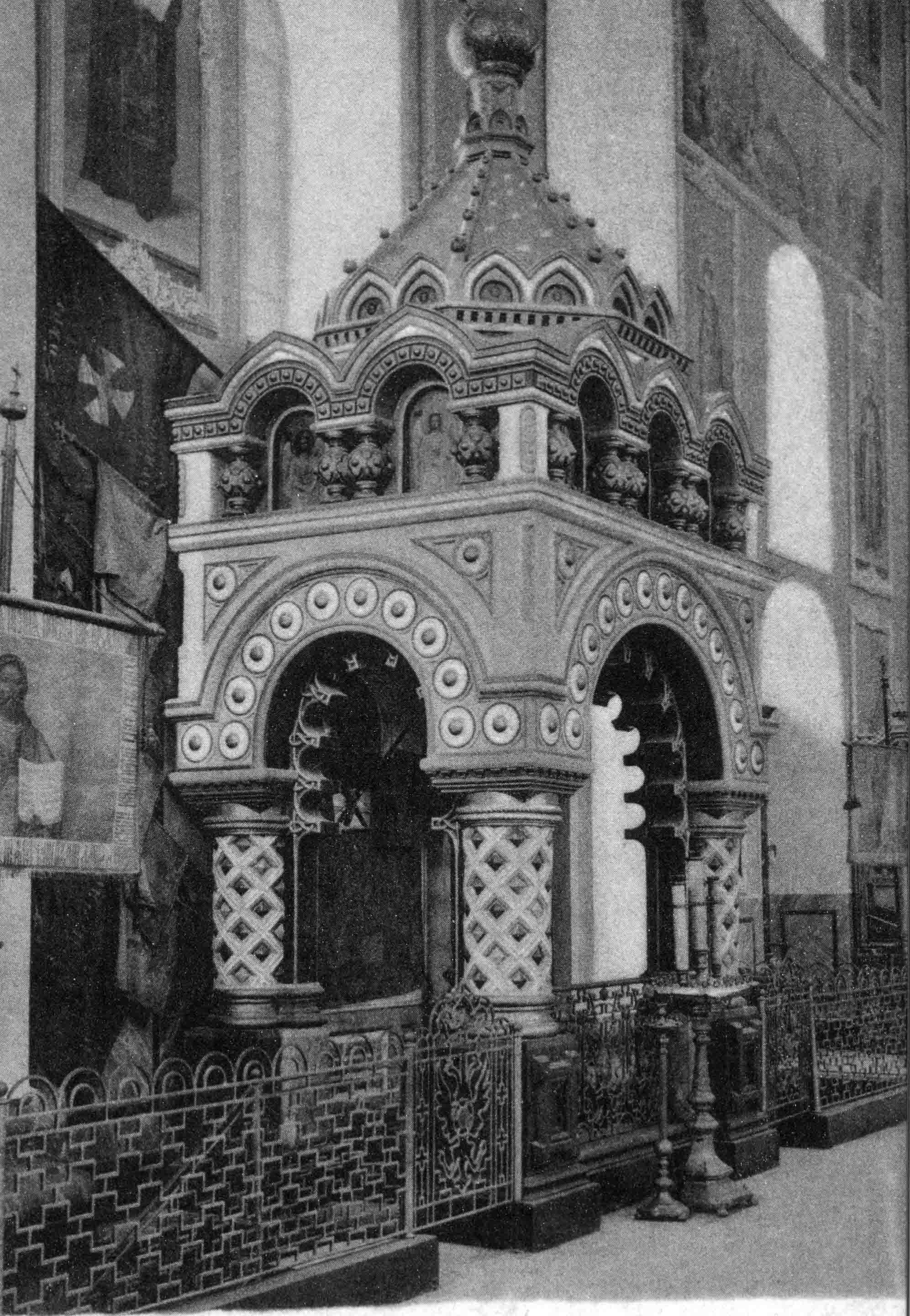 Гробница Козьмы Минина в Спасо-Преображенском Соборе Нижнегородского кремля. Возведена Л. В. Далем в 1870-е гг